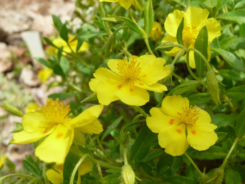 Botanischer Garten Erlangen, 2008